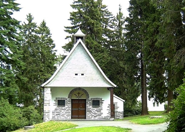 Kapelle in Jagdhaus (Schmallenberg), Germany.